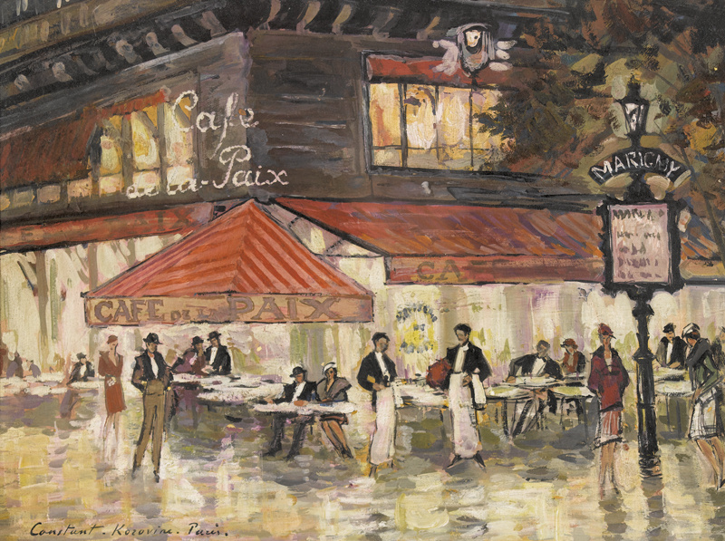 Café de la Paix à Paris. Öl auf Malkarton, signiert und bezeichnet "Paris", 40 x 55 cm